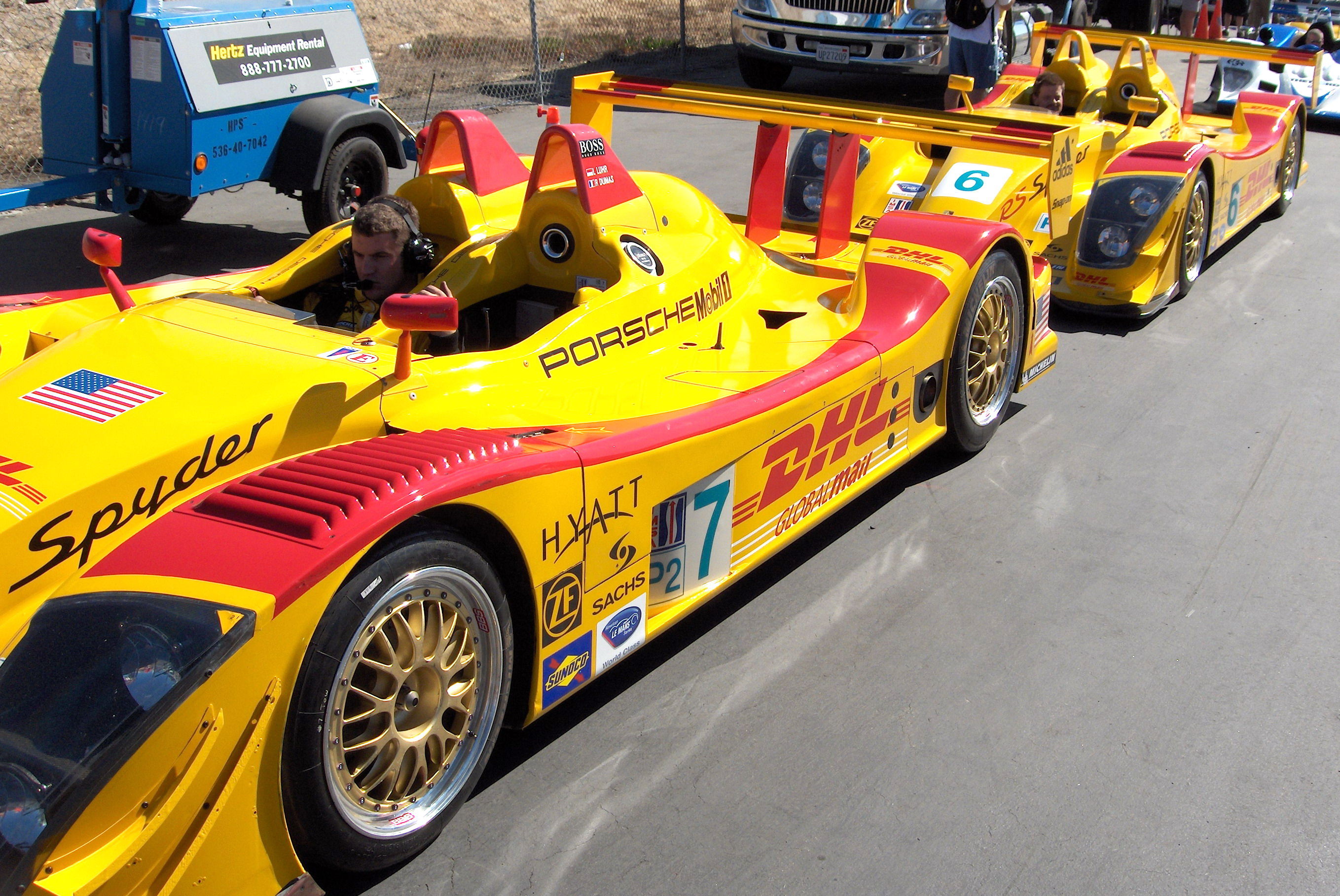 Porsche RS Spyder in Staging Queue